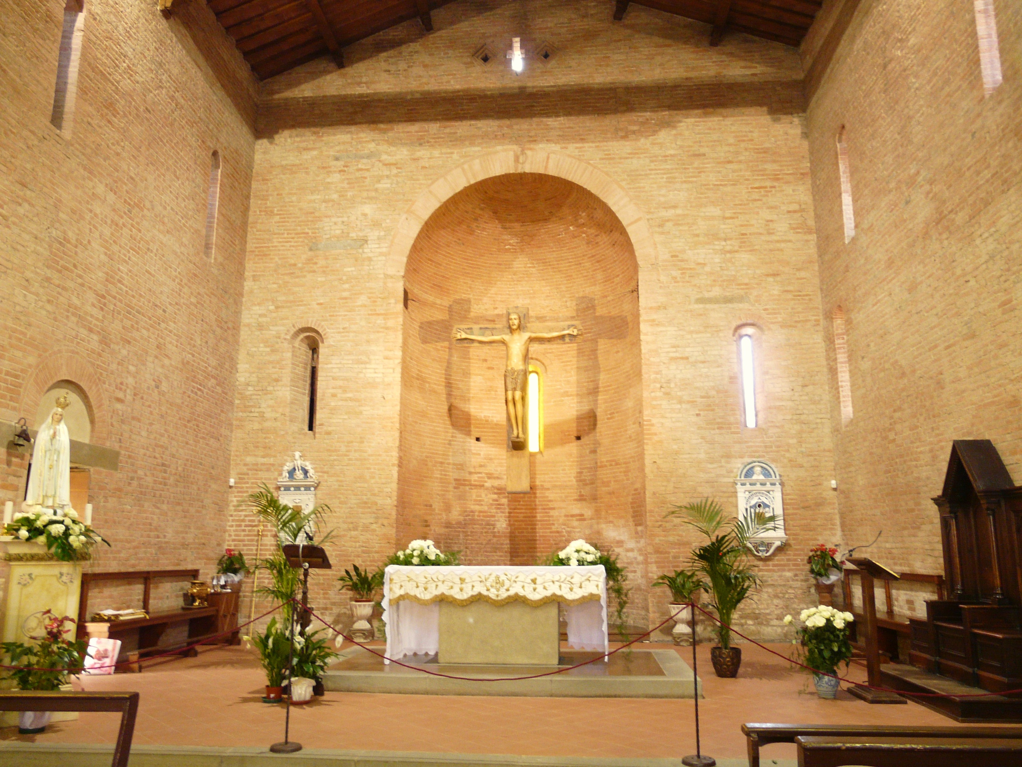 Altare della Chiesa dei Santi Jacopo e Filippo, Certaldo Alto, Certaldo, Toscana, Italia